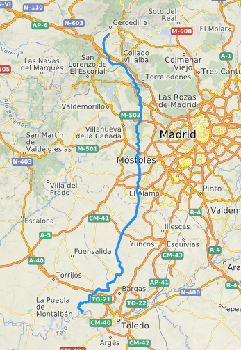 carte réalisée sur umap This map may be incomplete, and may contain errors. Don't rely solely on it for navigation.